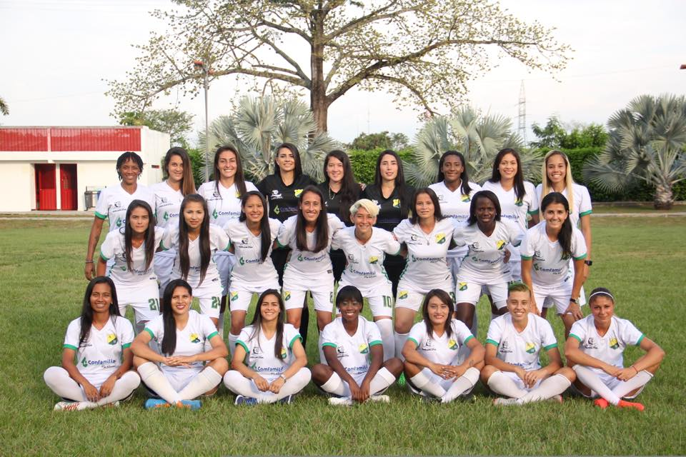 Integrantes del equipo Profesional del Atletico Huila Femenino para afrontar la temporada 2017.